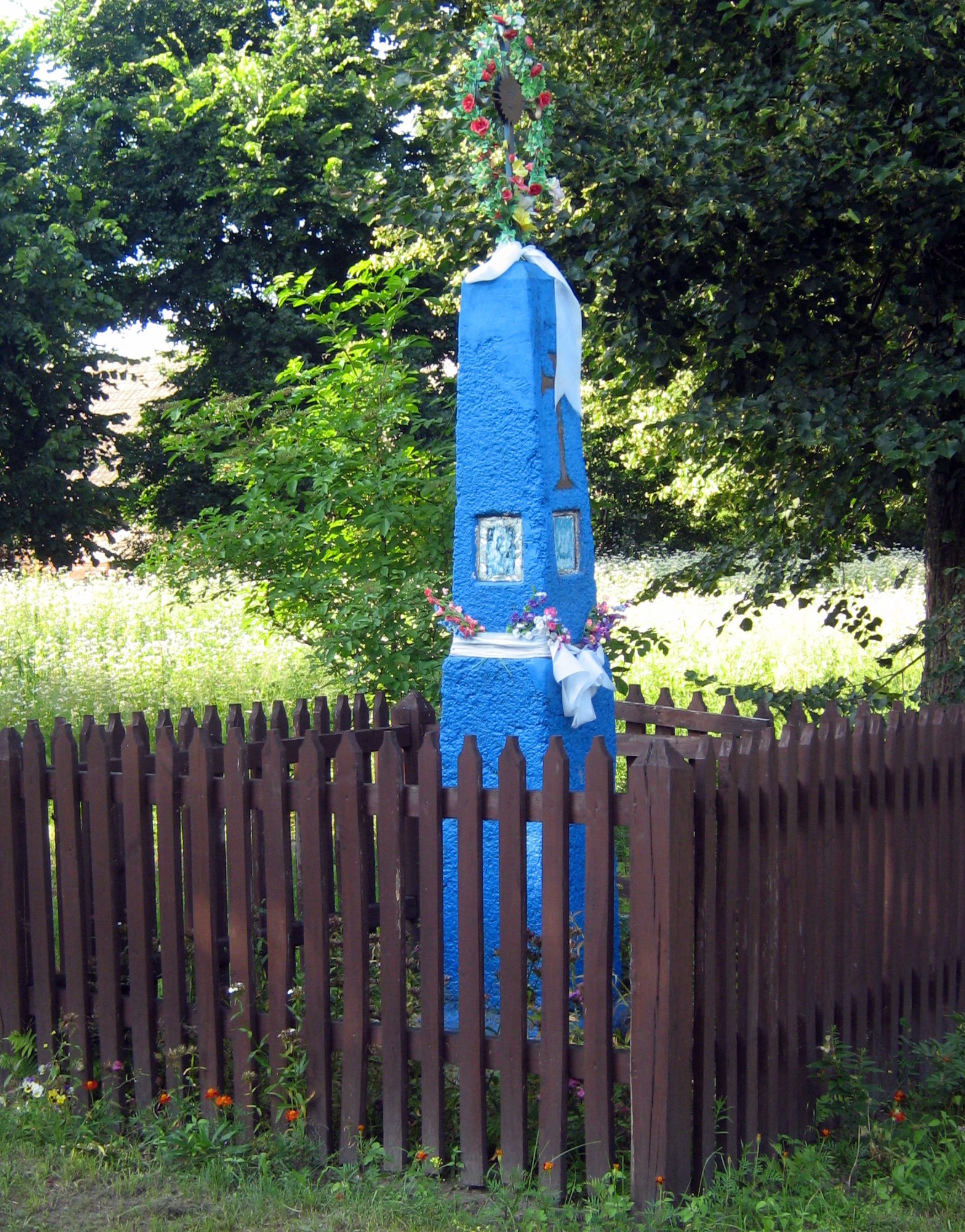 Krzyż w Kotłówce.